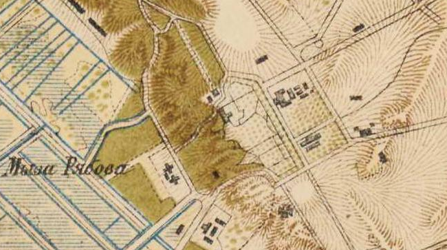 План мызы Рябово на карте окрестностей Петербурга. 1885 г.